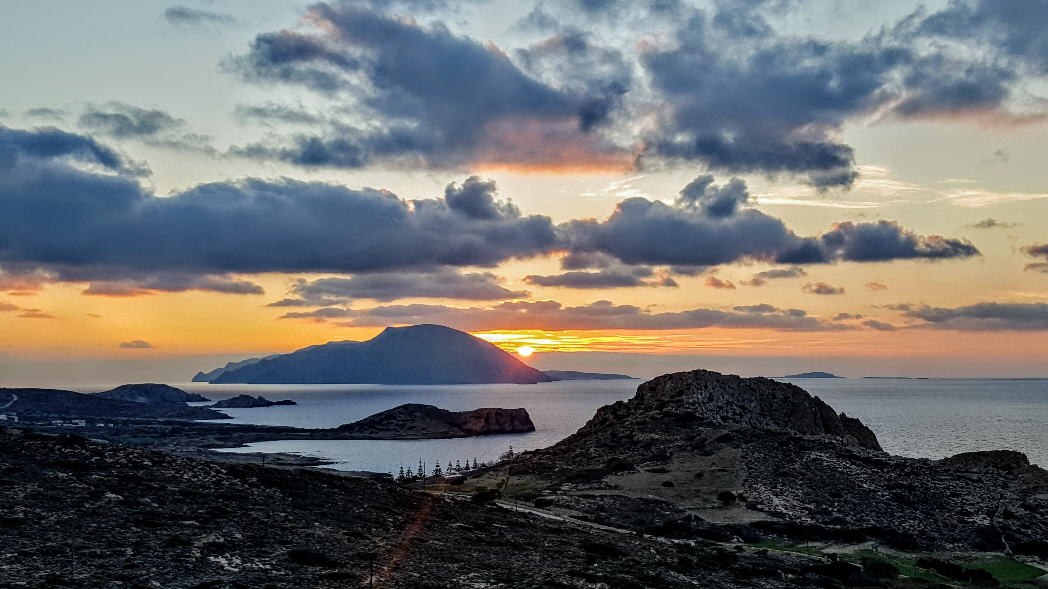 Sunset in Arkasa